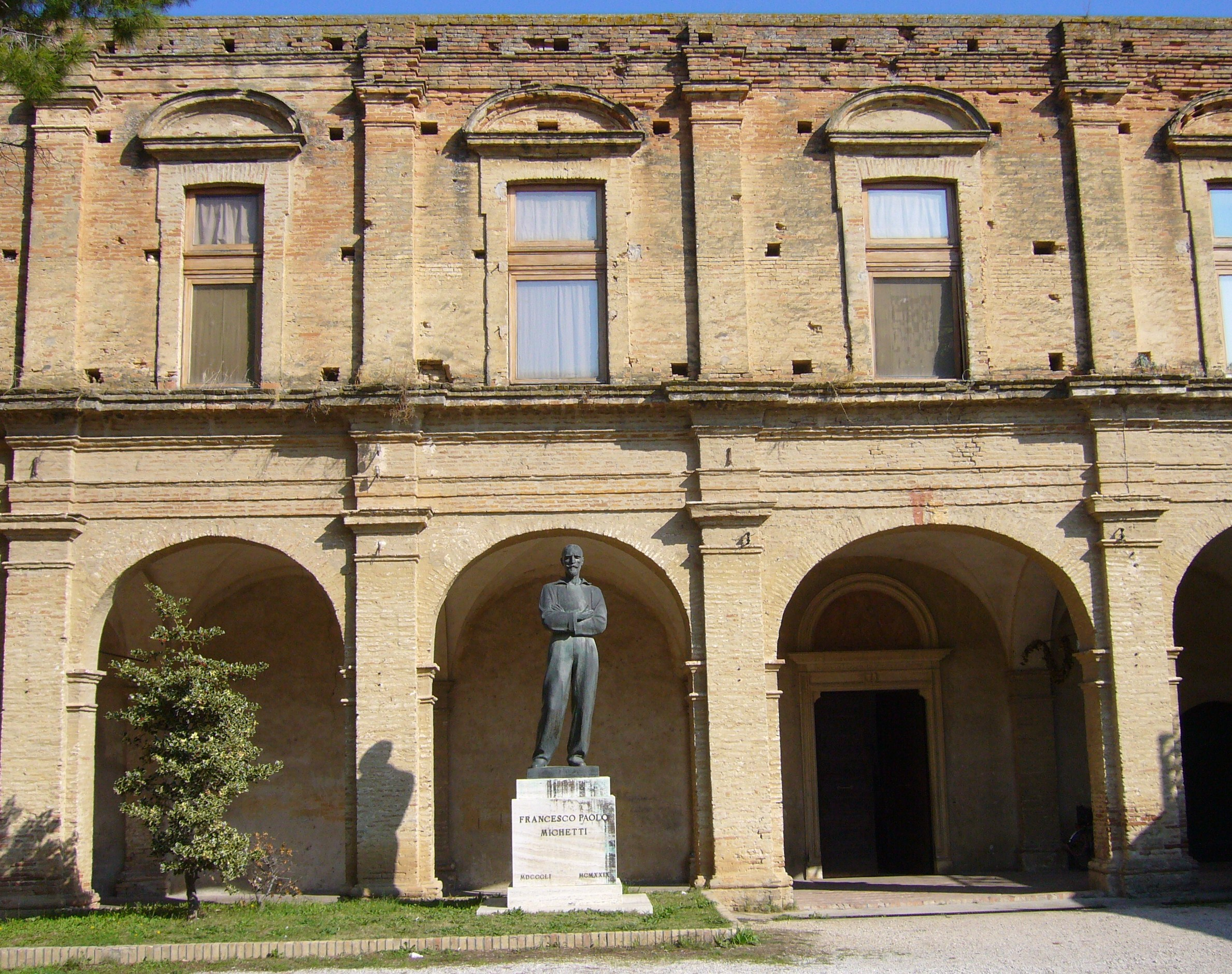 Piazza Michetti